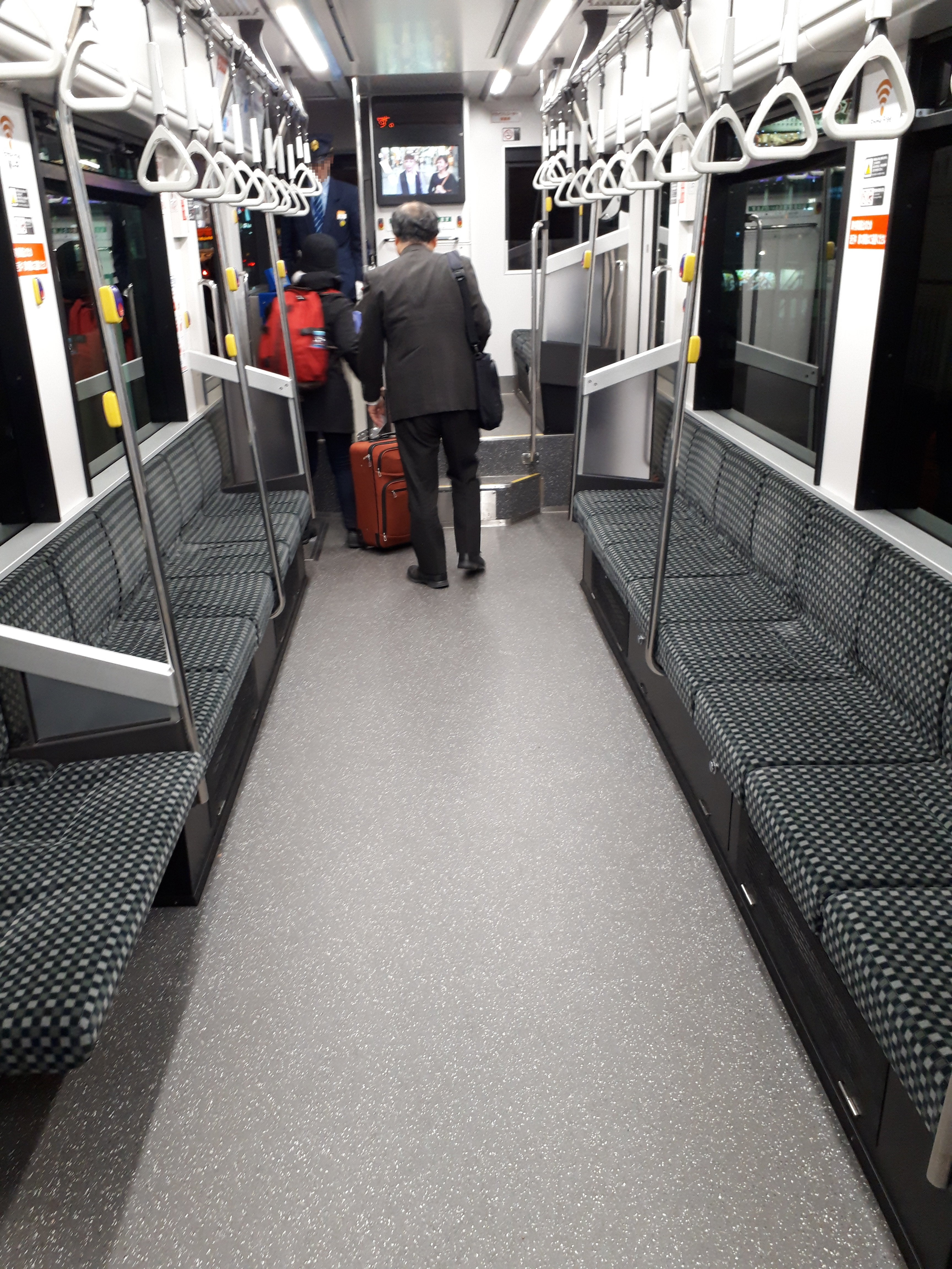 モハ5000形車内